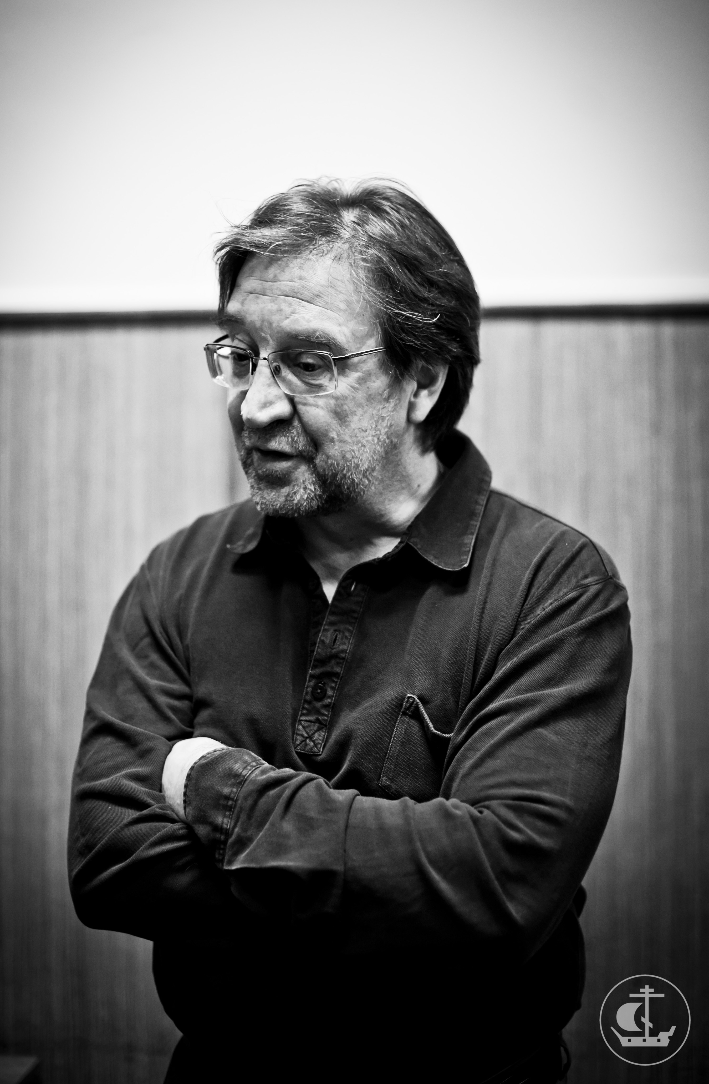 Юрий Шевчук в СПбДА